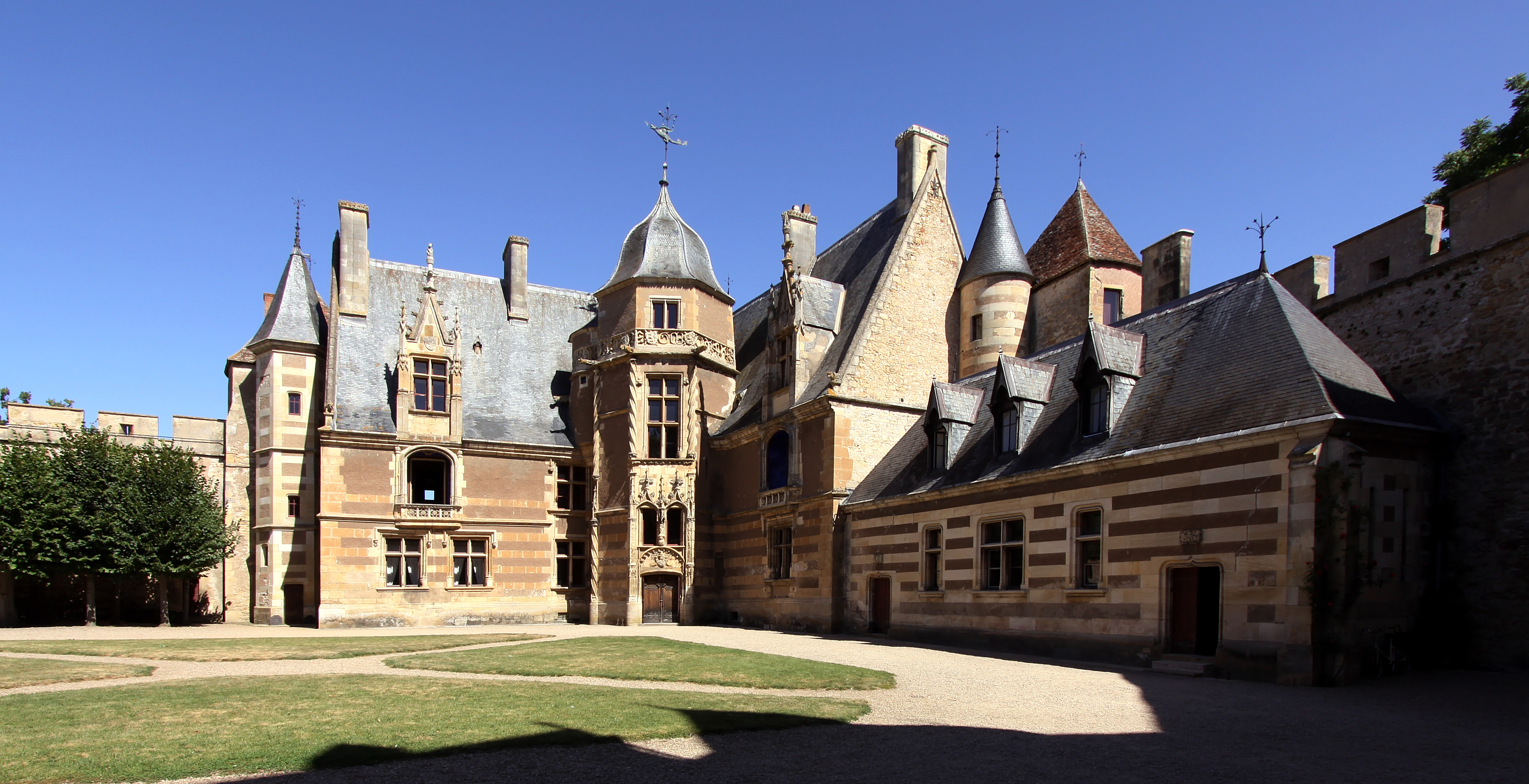 Schloss Ainay-le-Vieil im französischen Département Cher - Gebäudetrakt im Innenhof mit Haupteingang im Treppenturm.